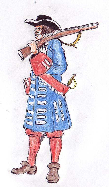 caporal du régiment des grenadiers de france en 1672